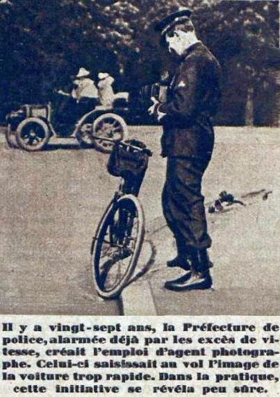 L'ancêtre du radar automobile français (1900).